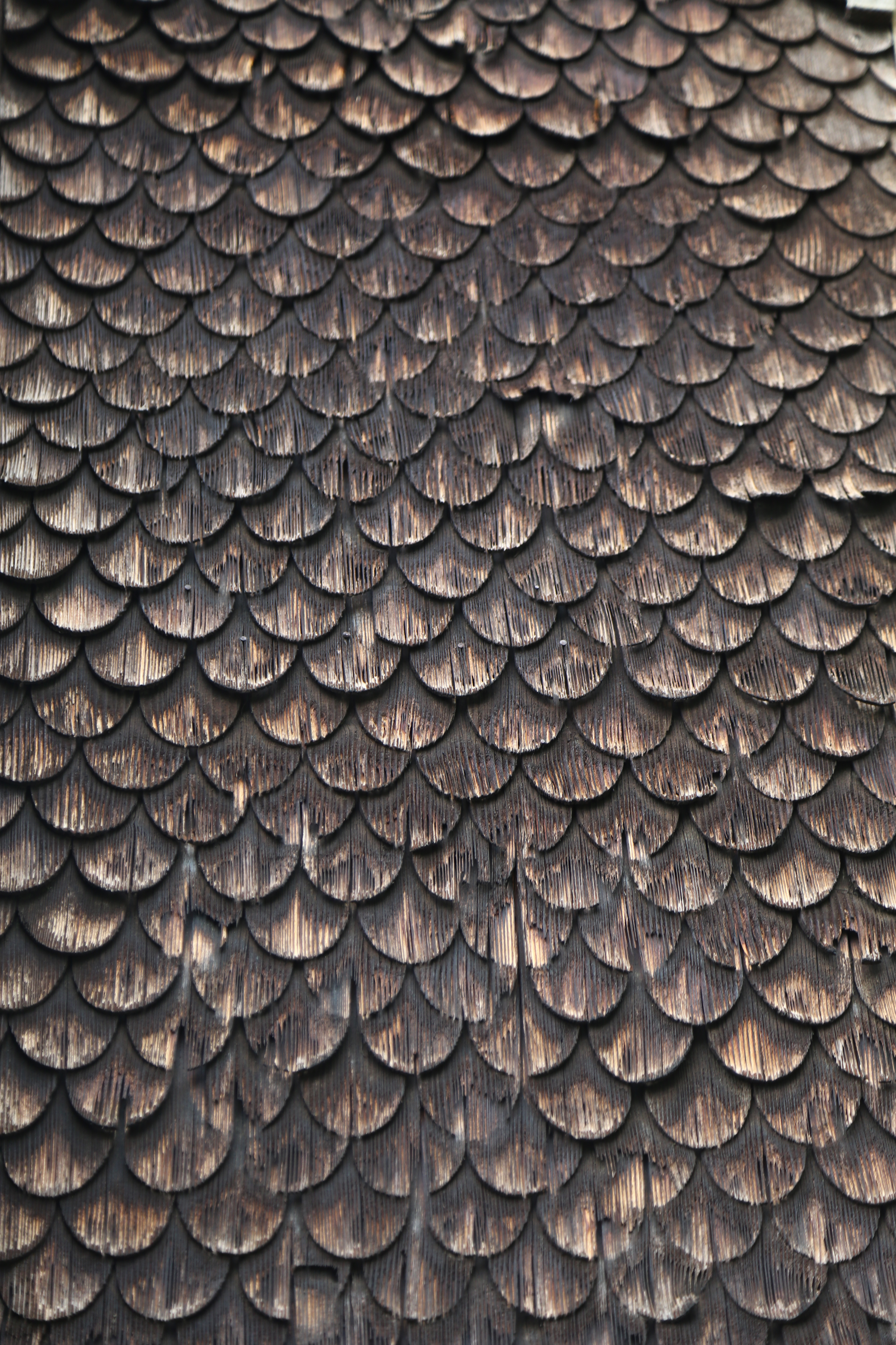 Walserhaus Triesenberg, Detail der Holzschindeln an der Fassade